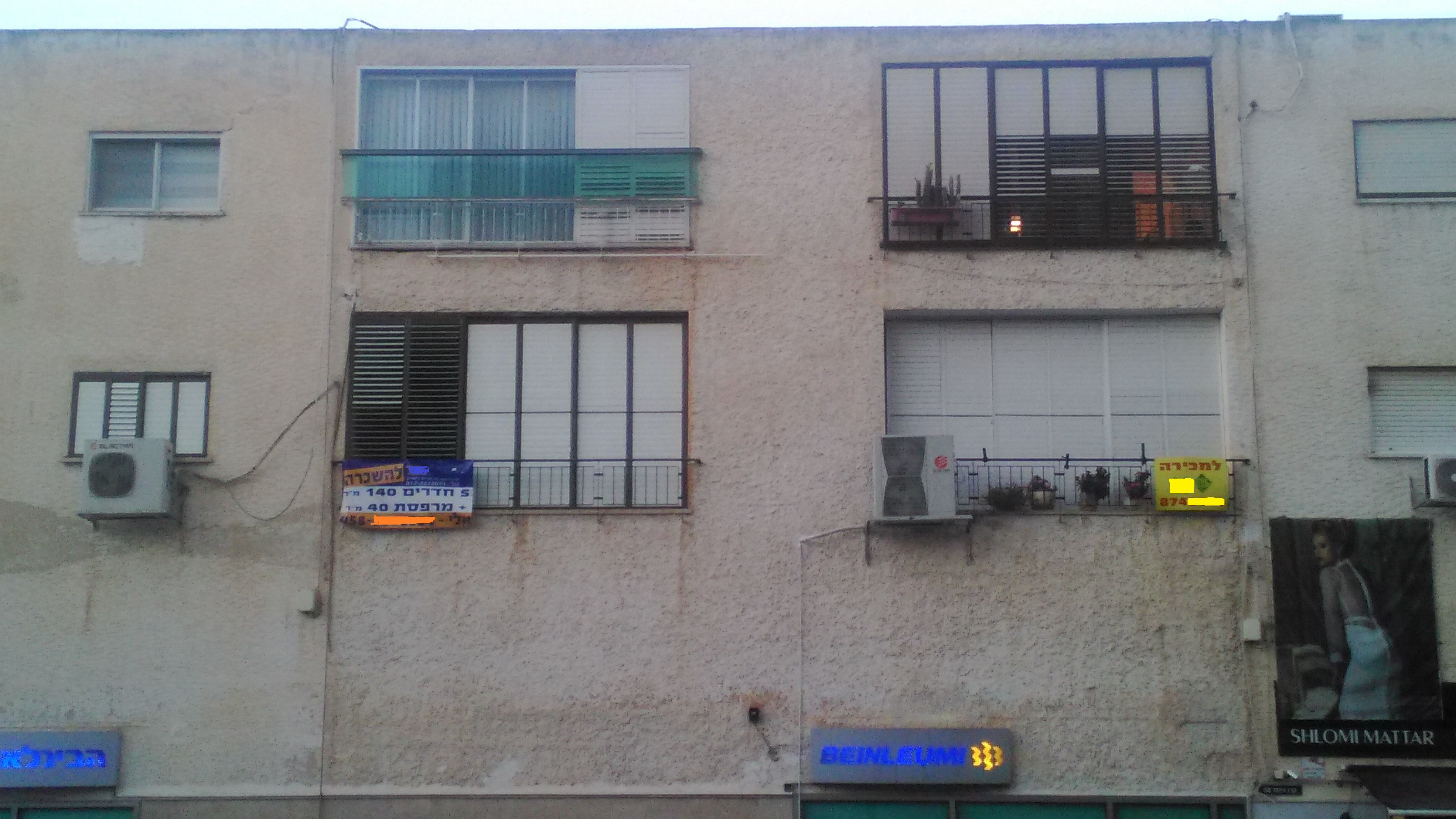 דירות המוצעות למכירה על ידי משרדי תיווך